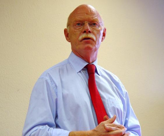 Peter Struck